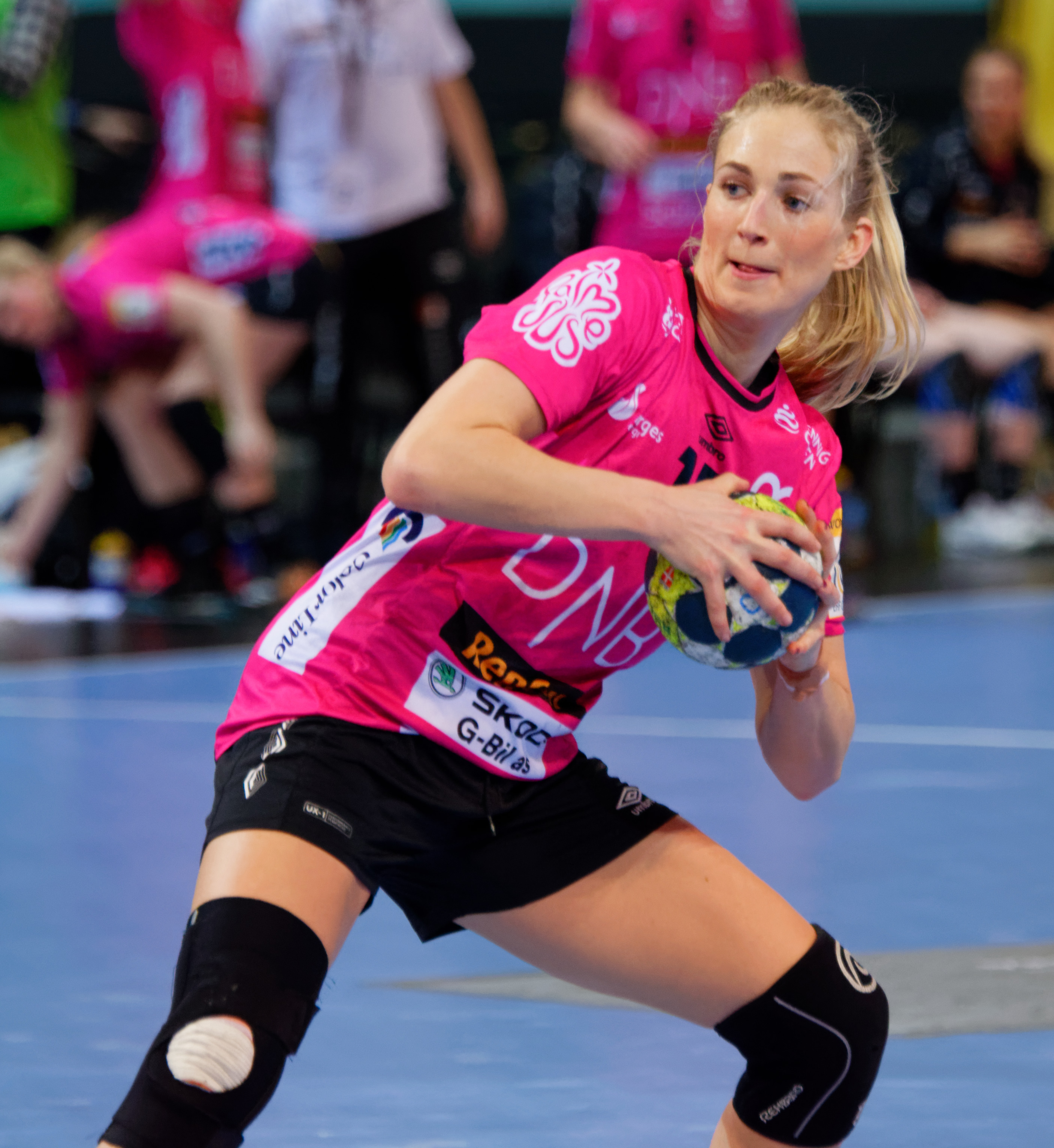 Rencontre du tour principal de coupe EHF entre Issy Paris Hand et les norvégiennes de Vipers Kristiansand au vélodrome de Saint-Quentin en Yvelines, le 03 février 2018.